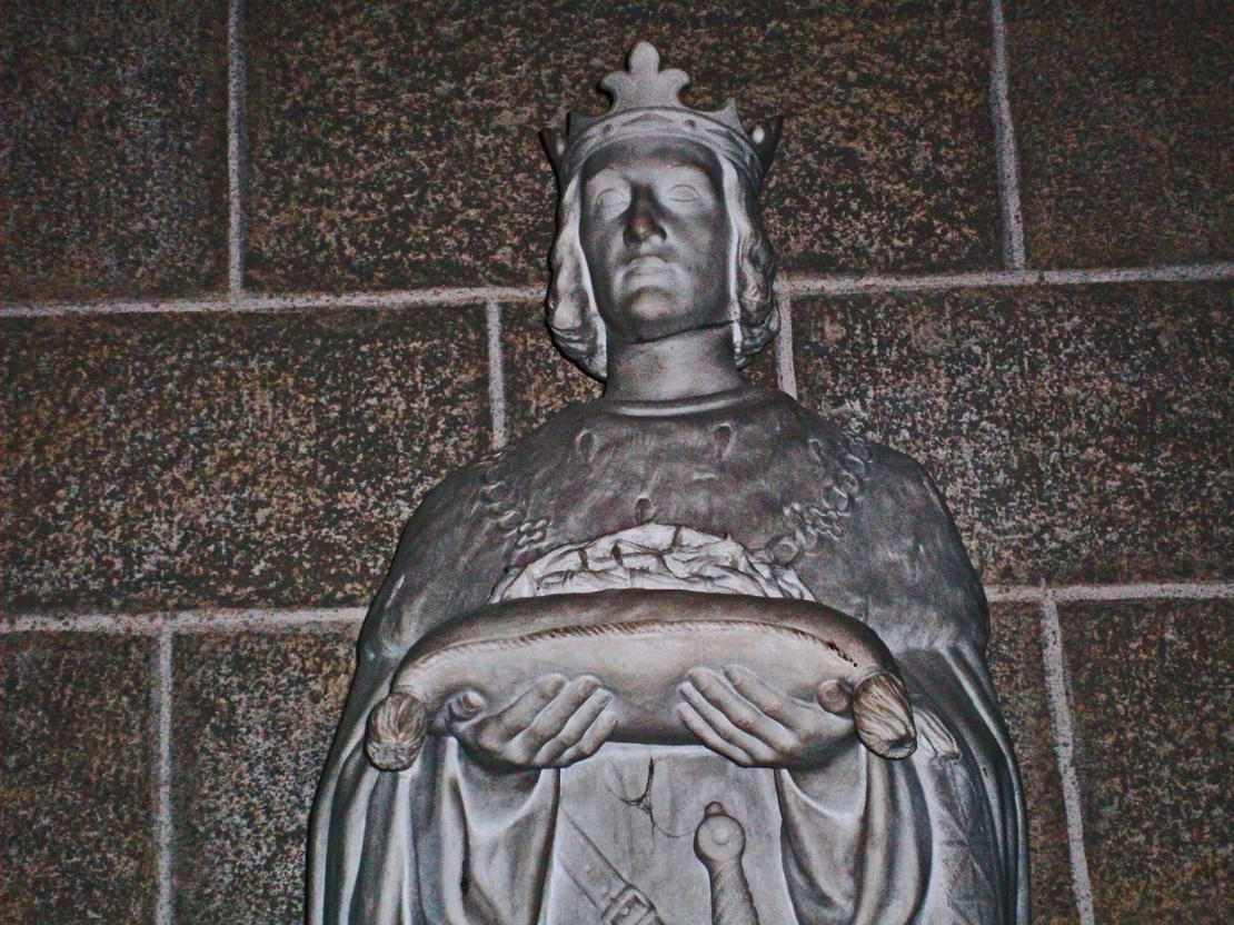 Statue de Saint Louis portant la couronne d'épines, Cathédrale Notre-Dame du Puy-en-Velay, France.